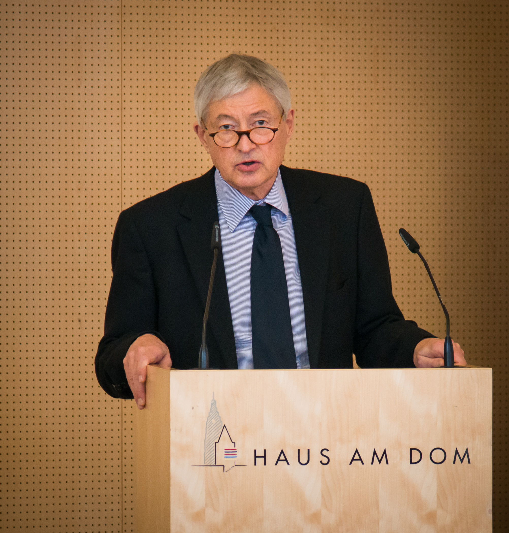 Werner Busch auf einer Veranstaltung des Freien Deutschen Hochstiftes im Haus am Dom in Frankfurt am Main (Dezember 2013)